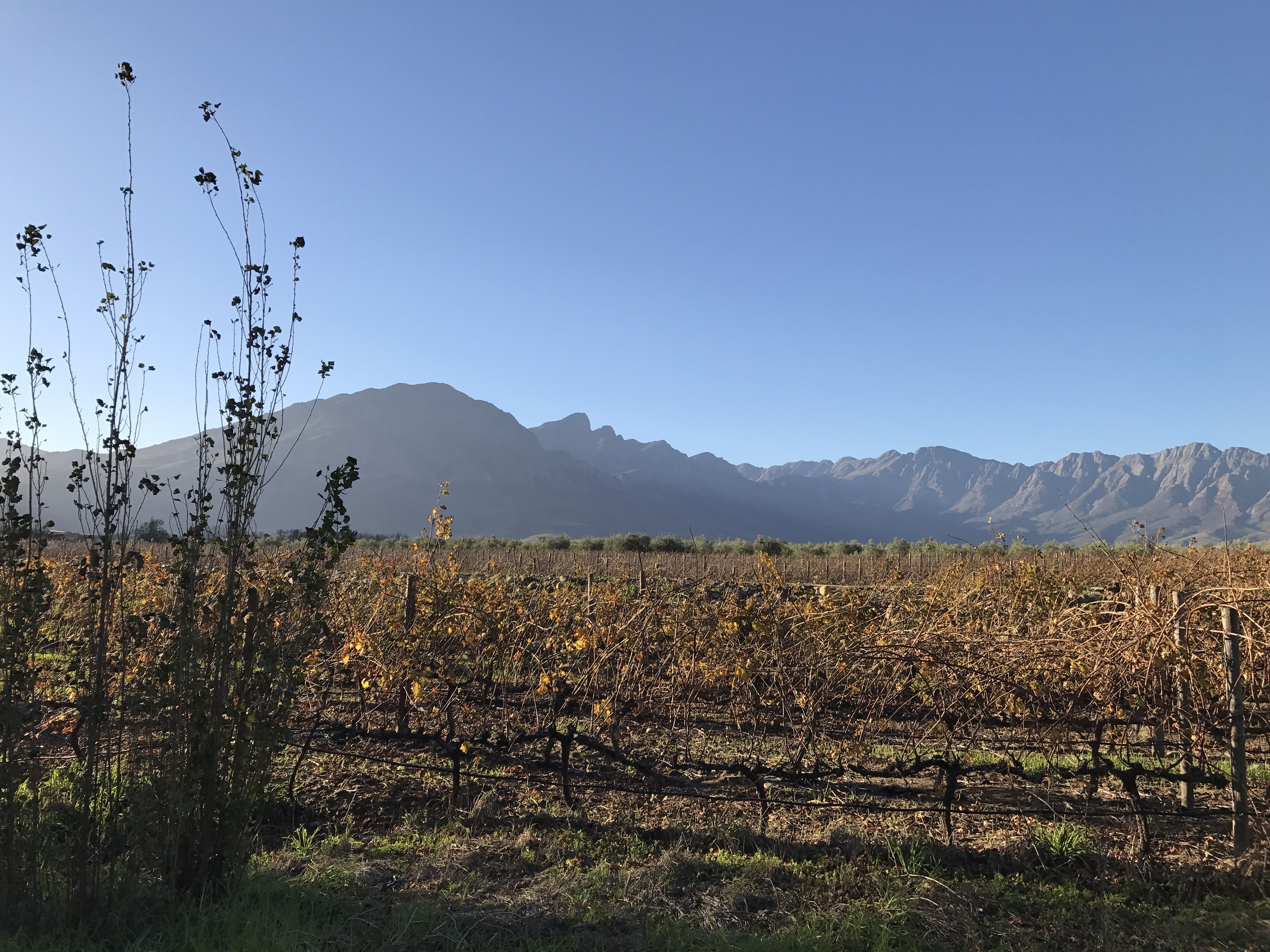 Wingerd met jong populiere op Saronsberg-wynlandgoed en met gelyknamige berg in die agtergrond, in Tulbagh, Wes-Kaap.